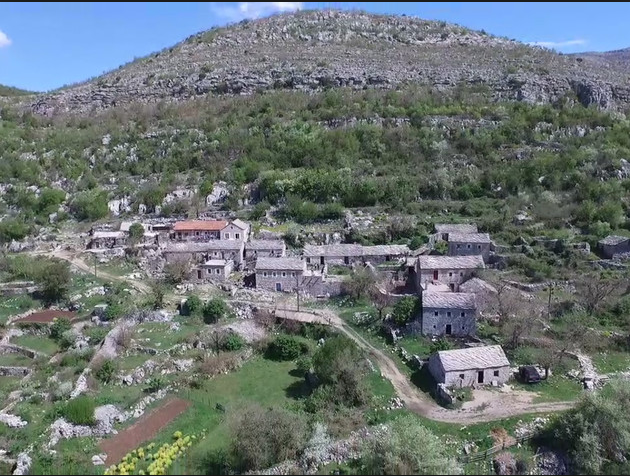 Куће